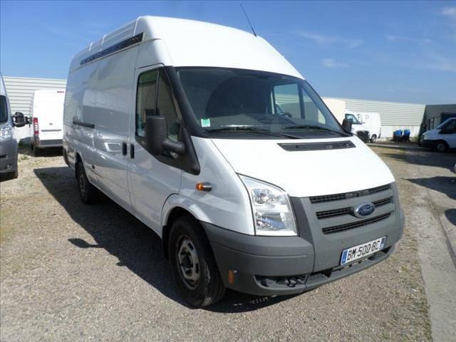 Ford Transit phase 2